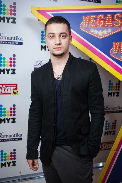 певец